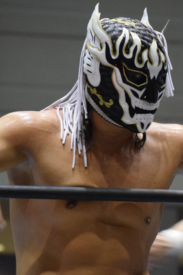 2017年5月31日 大阪府立体育会館・第二競技場 「BEST OF THE SUPER Jr. 24」 エル・デスペラード